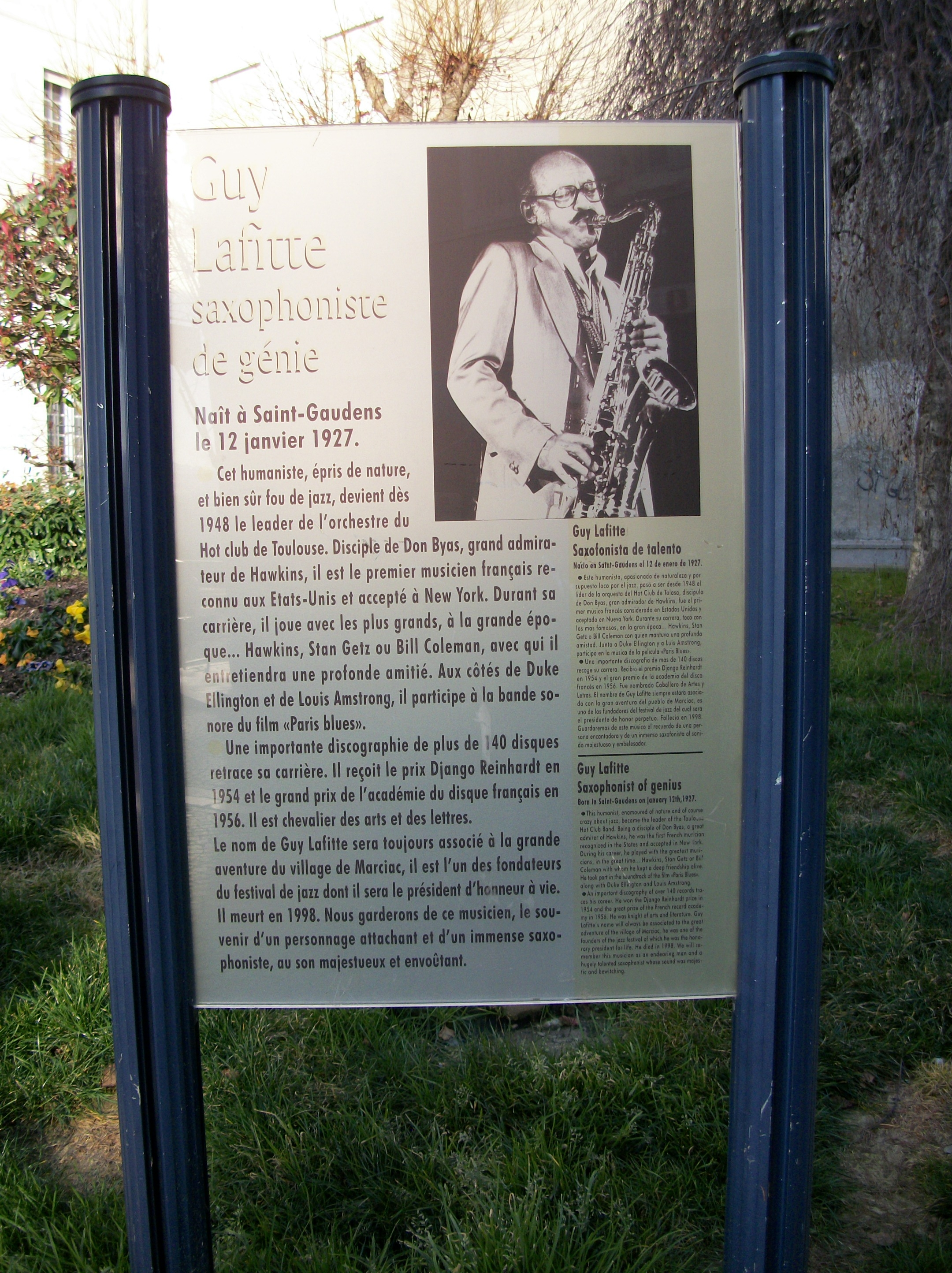 Plaque commémorative en hommage à Guy Lafitte. Saint-Gaudens, France.